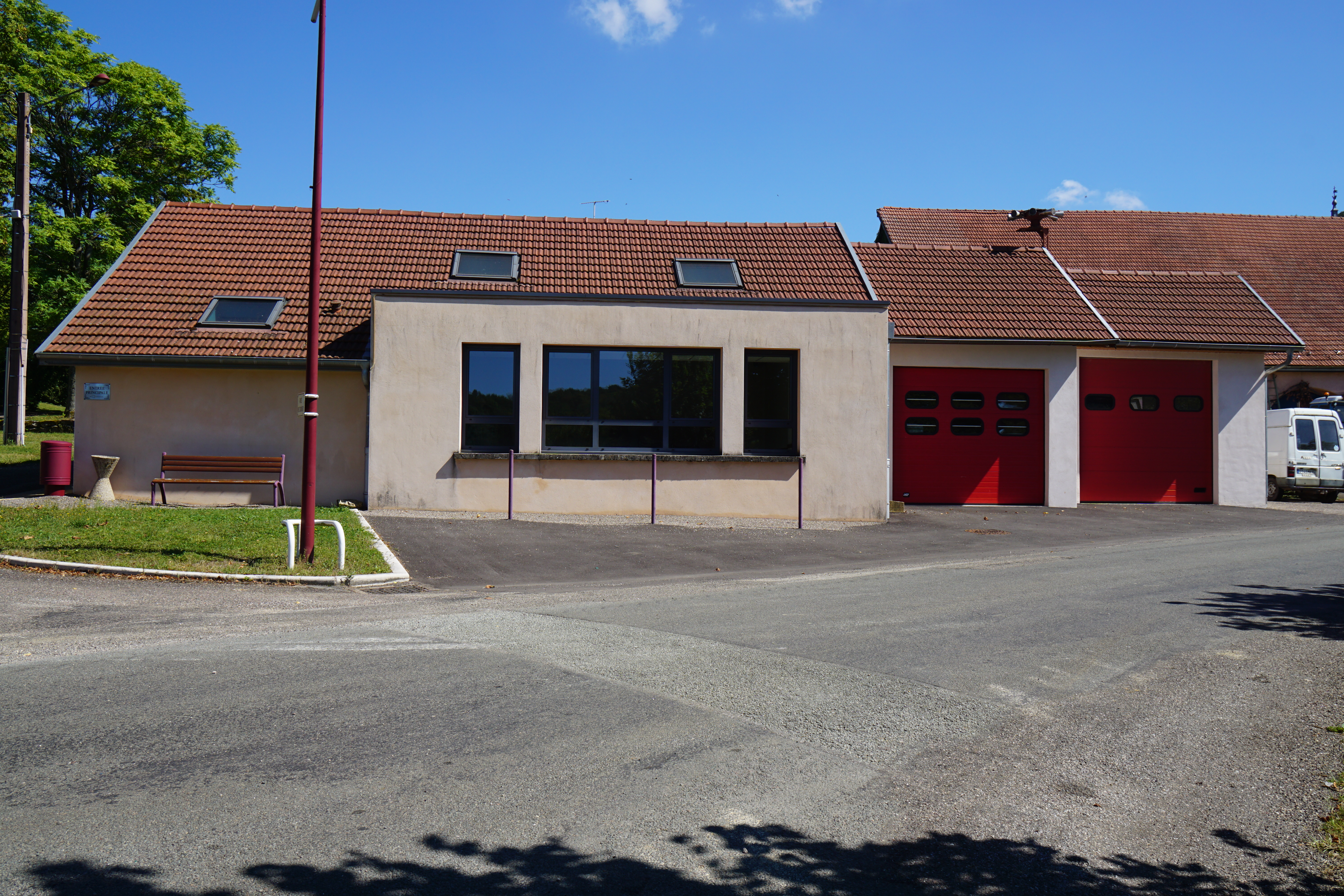 Caserne des pompiers de Villers-sur-Saulnot.